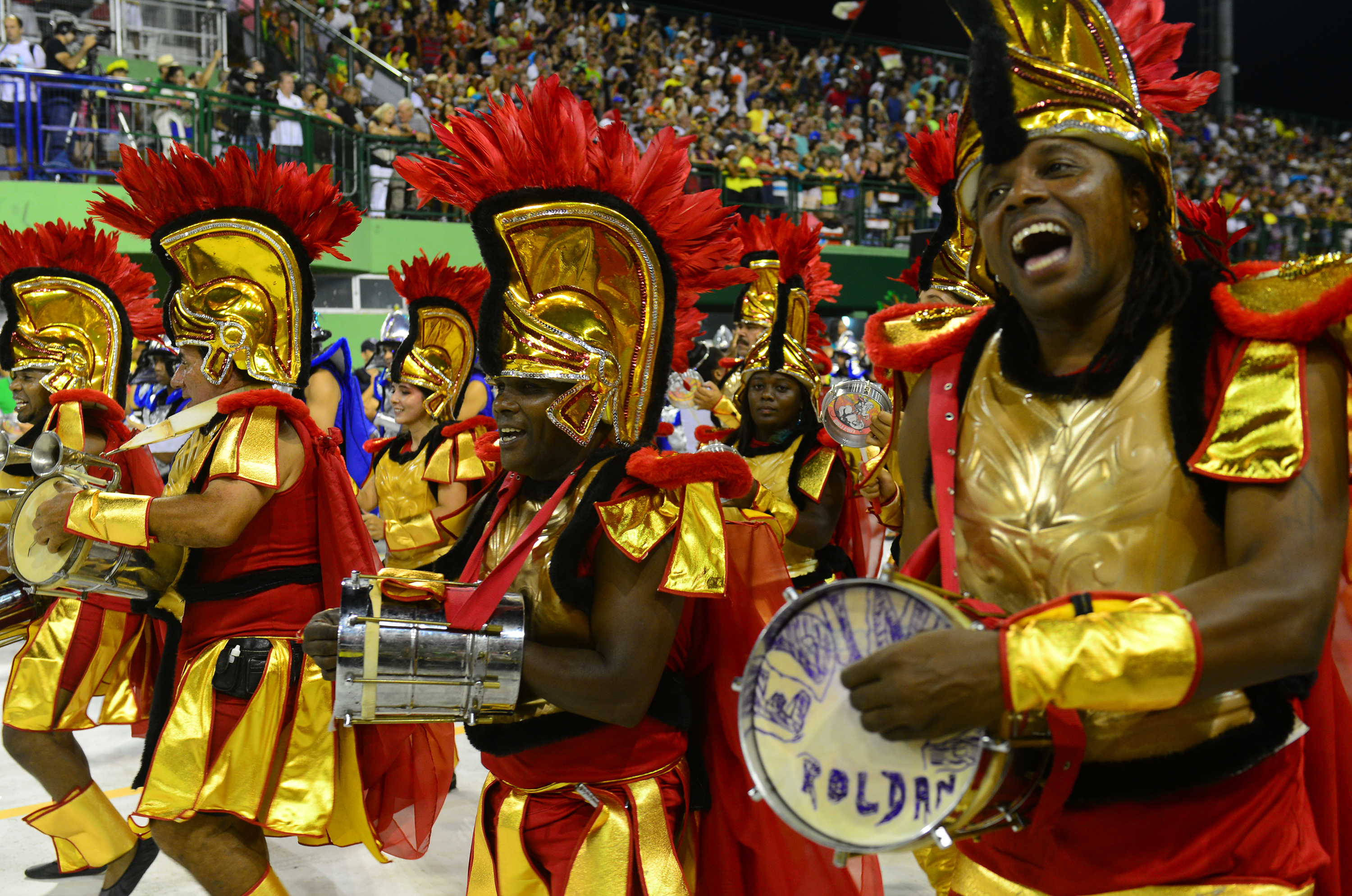 Bateria durante o desfile da SCRS Embaixada Copa Lord em 2014.